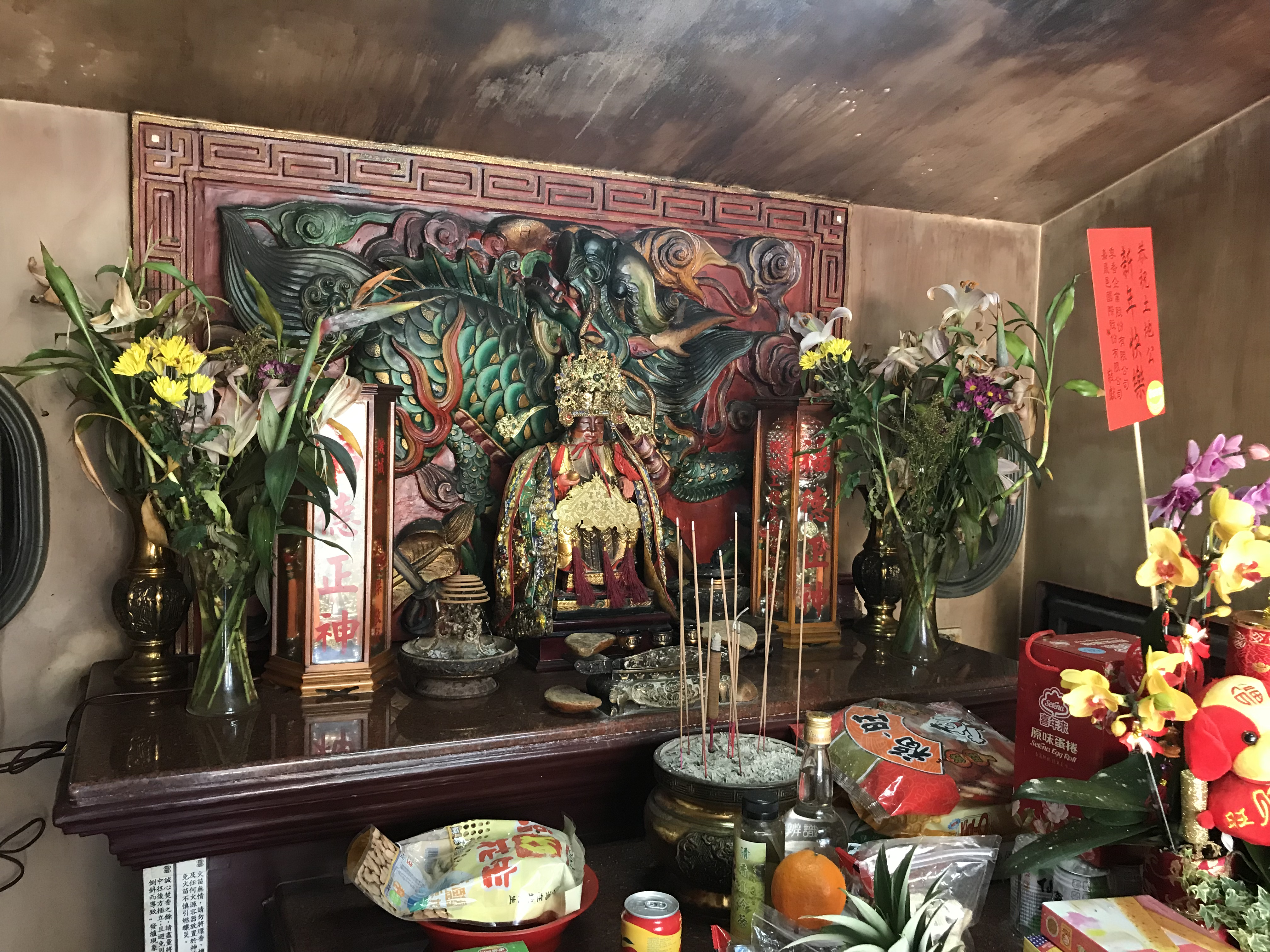 六輕福德宮神像